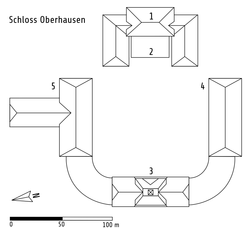 Plan von Schloss Oberhausen de: 1 Haupthaus, 2 Foyer Vitrine, 3 Kleines Schloss, 4 Wirtschaftsgebäude (Gedenkhalle), 5 Wirtschaftsgebäude (Restaurant) en: 1 Main building, 2 Foyer cabinet, 3 Small castle, 4 Outbuilding (remembrance hall), 5 Outbuilding (restaurant)